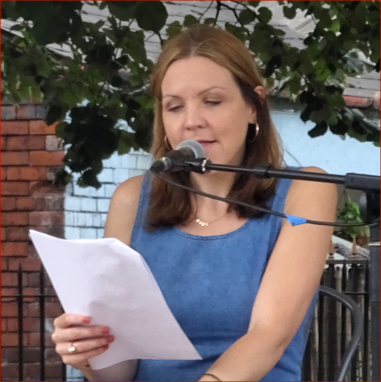 Catrin Dafydd (Bardd y Goron), Eisteddfod Caerdydd, Awst 2018.